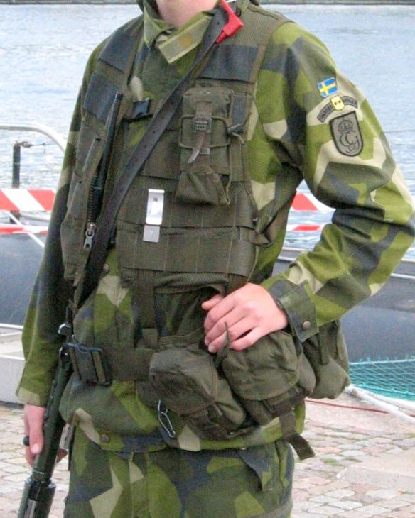 Svenska försvarmaktens Stridsväst 2000.